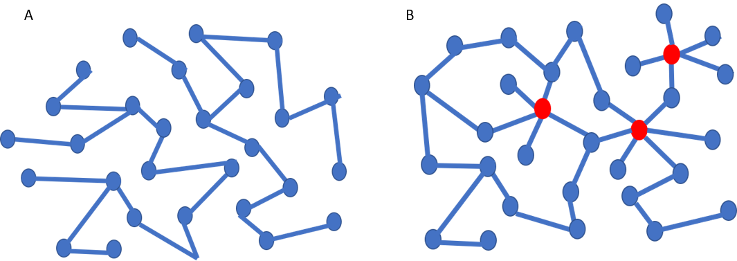 Ce schéma décrit les différentes architectures topologiques que l'on peut retrouver au sein d'un réseau fonctionnel mycorhizien.Figure A: Structure aléatoire ou régulièreFigure B: Structure sans échelle